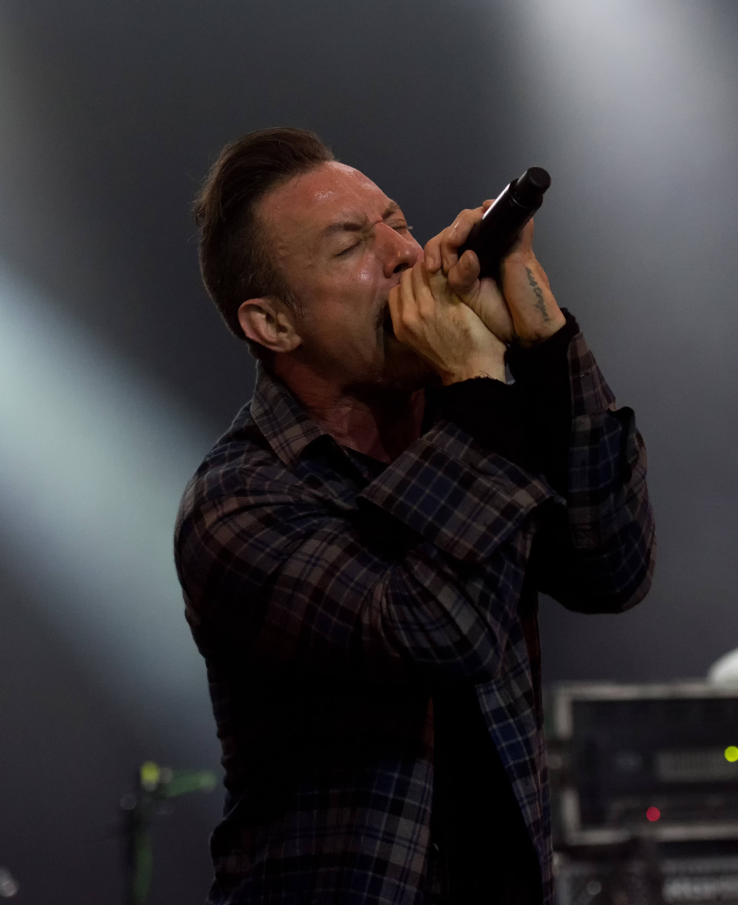 The Dillinger Escape Plan beim Wacken Open Air 2017